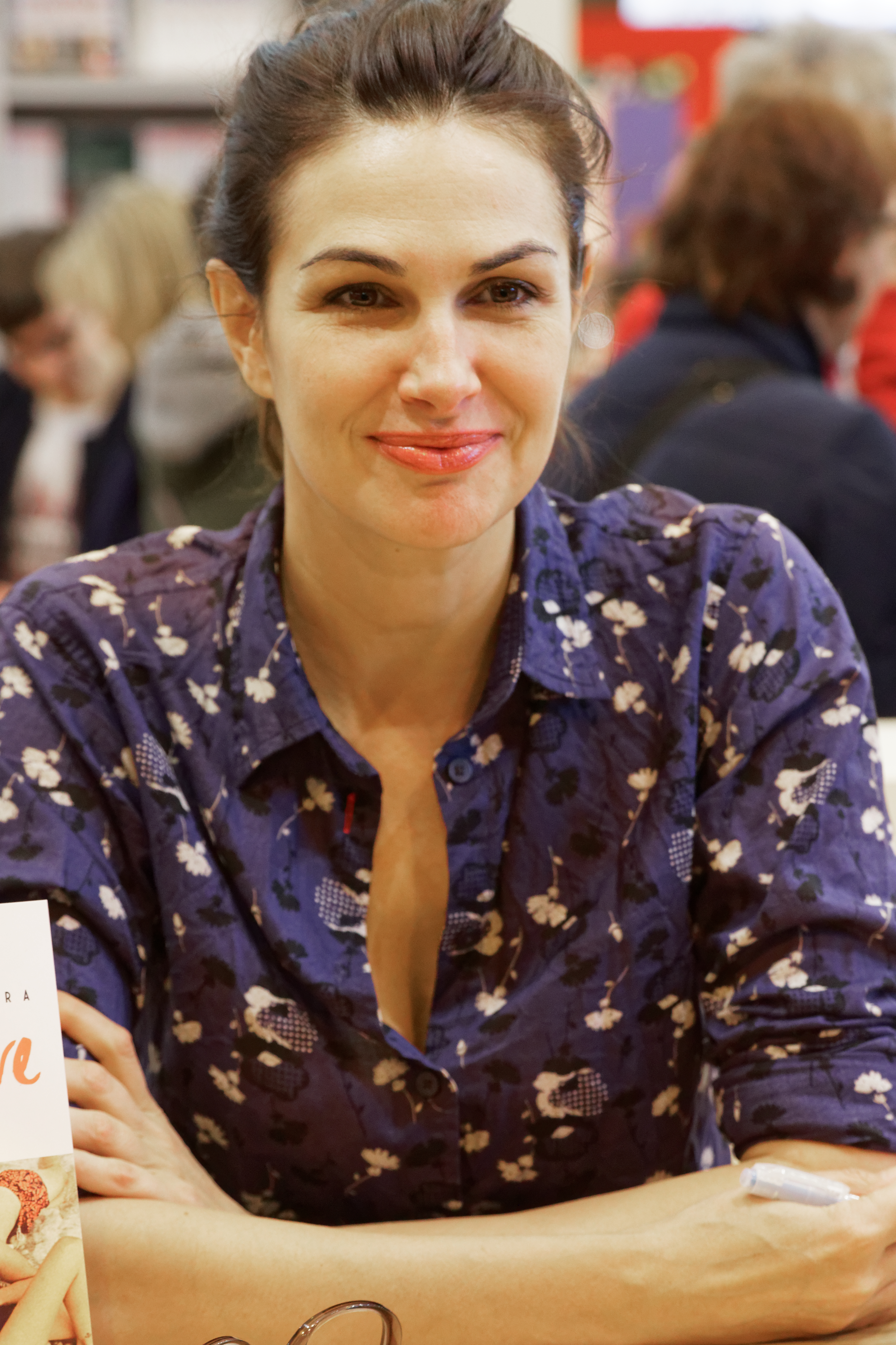 Helena Noguerra en dédicace lors du salon du livre de Paris 2017.